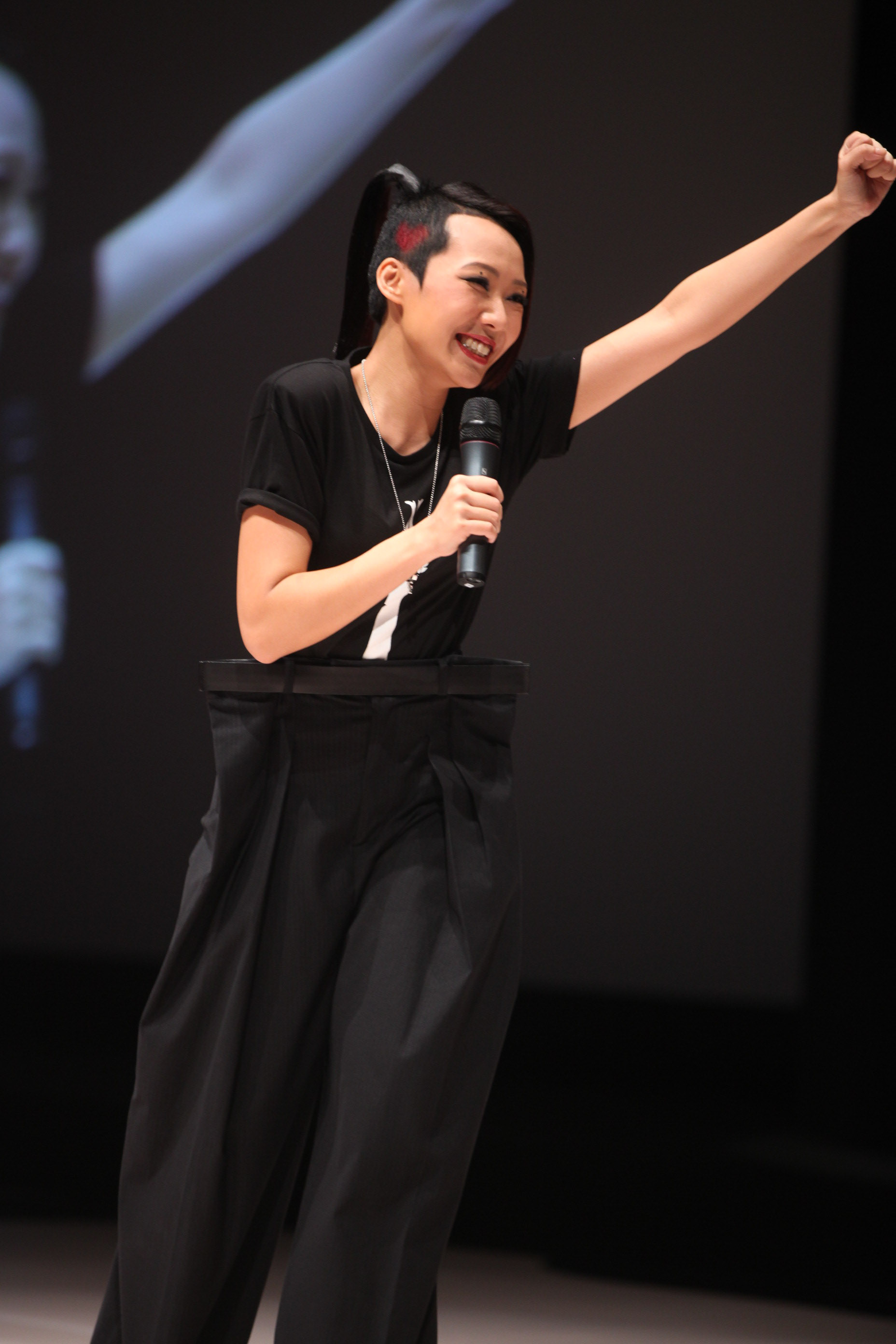 cheuk wan chi 死去活來one night stand